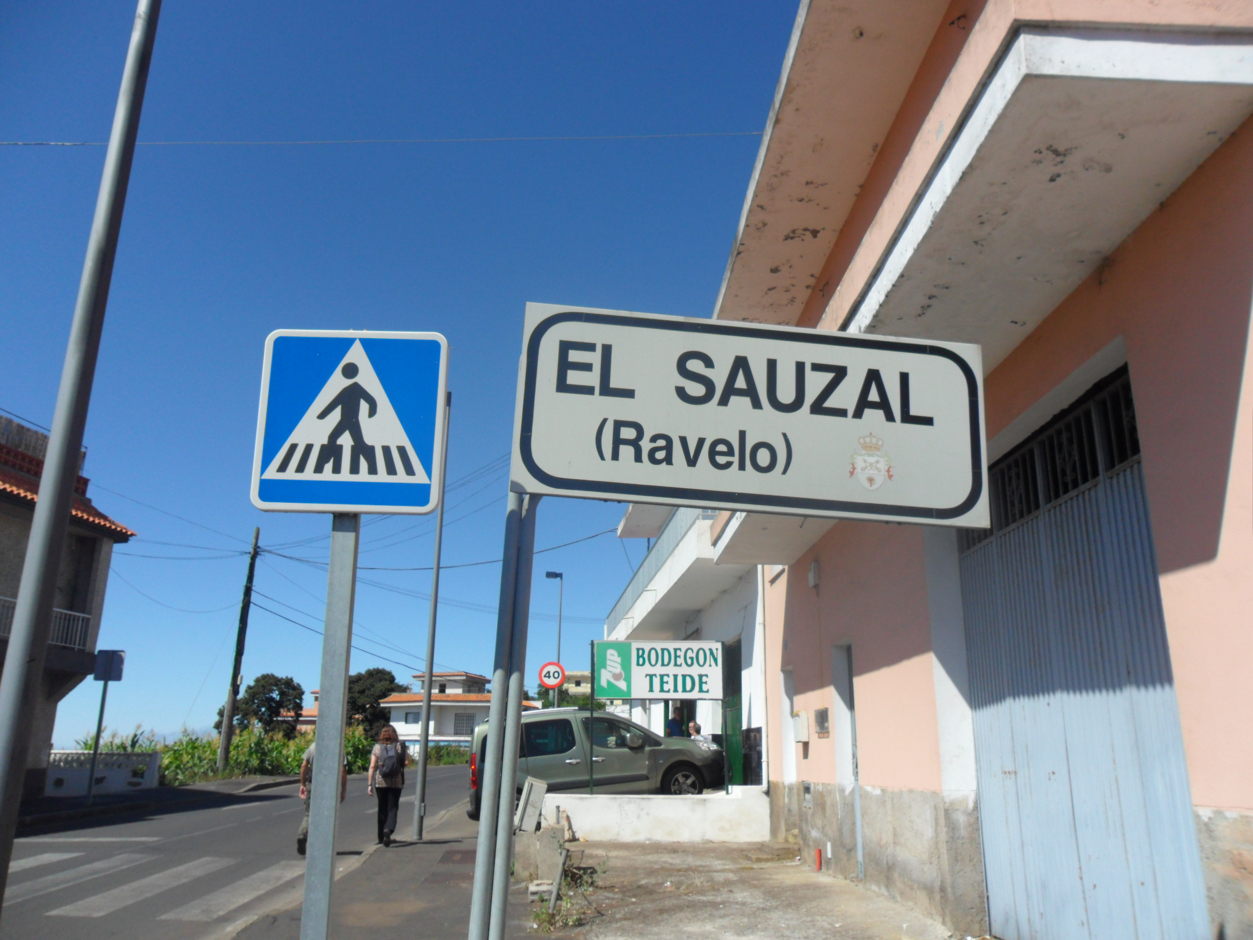 Entrando al municipio de El Sauzal por El Ravelo desde La Matanza